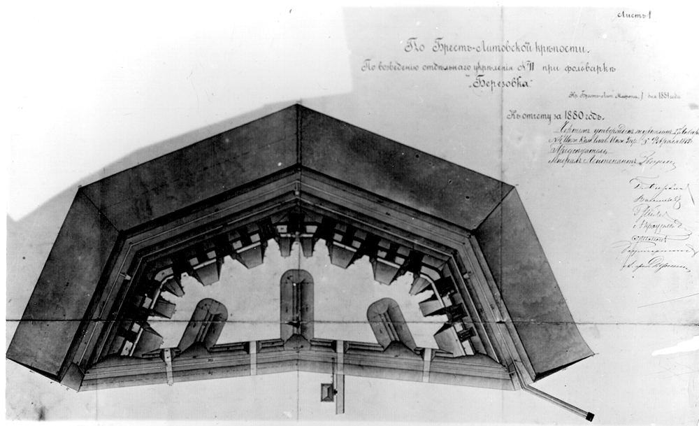 План форта №2, построенного при фольварке "Берёзовка" в 1880-х.